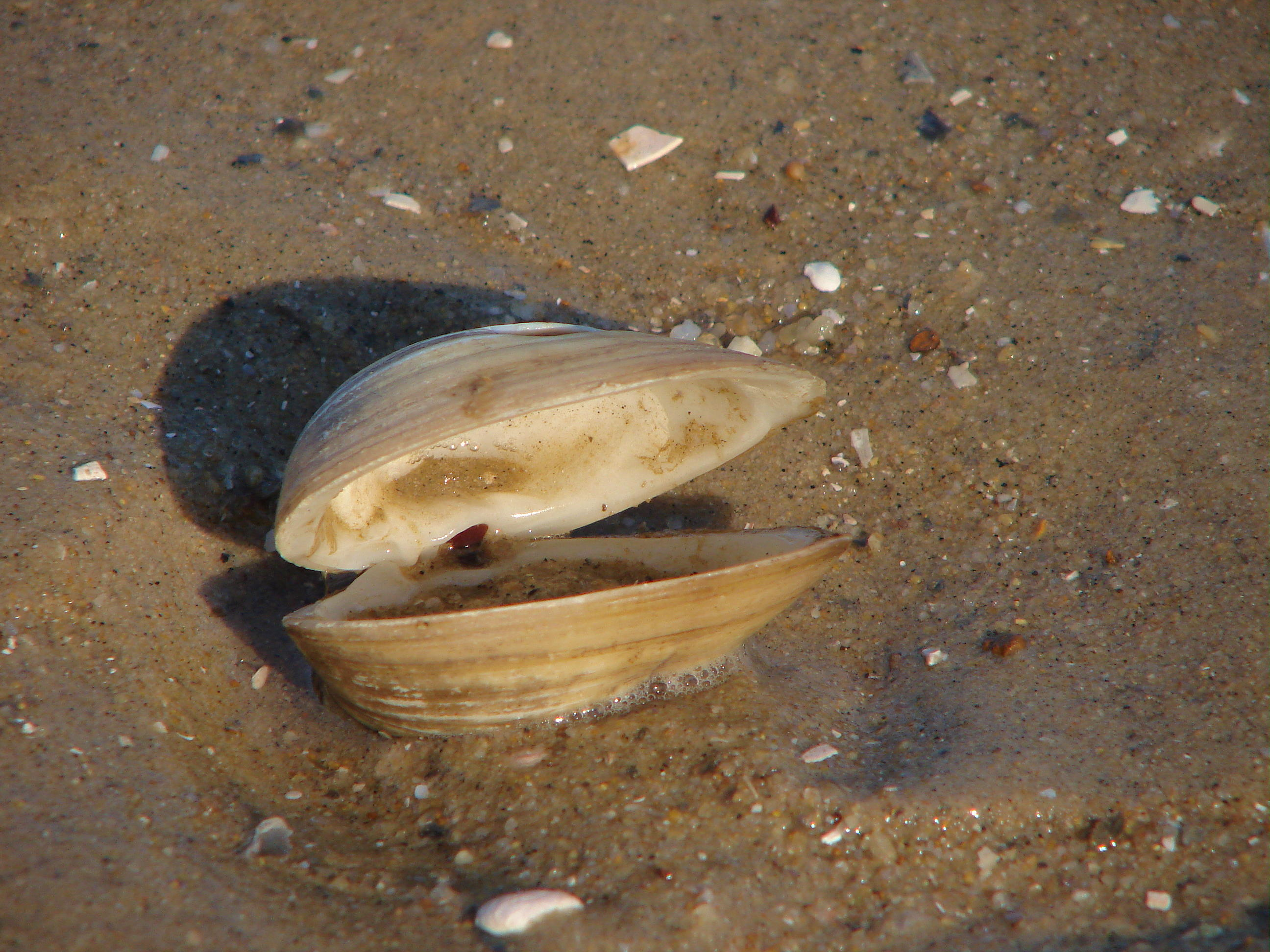 Sierra Exif JPEG